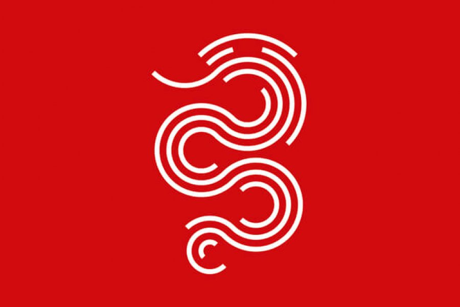 Logo nuovo Città di Bellinzona